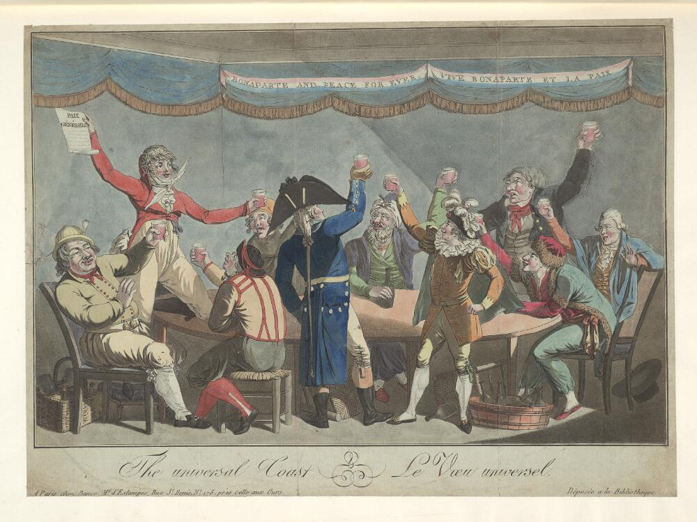 French political cartoon